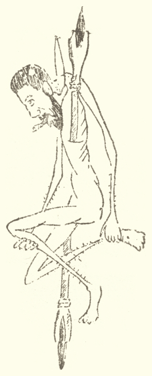 Autocaricatura del escritor uruguayo José Alonso y Trelles (1857 - 1924).